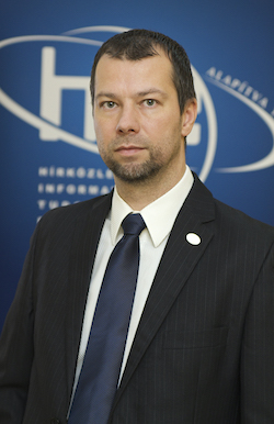 Nagy Péter 2015